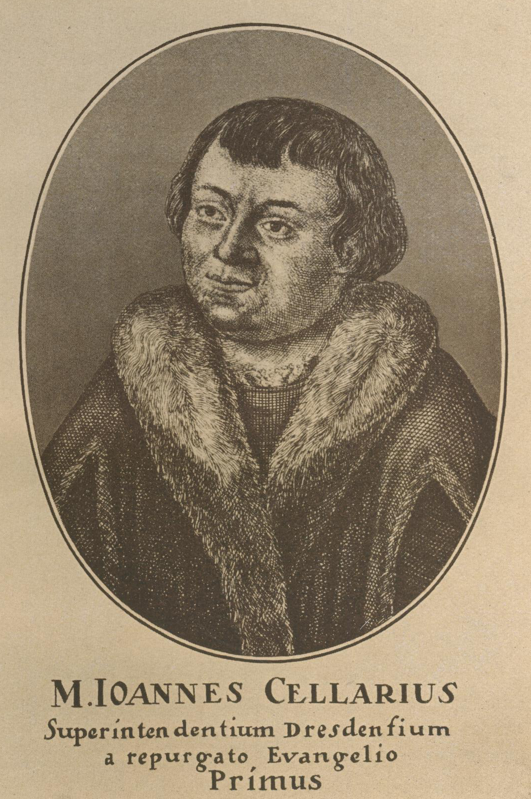 Zeitgenössisches Bildnis von Johannes Cellarius, ab 1539 (bis 1542) erster evangelischer Pfarrer in Dresden; Grundlage des Stiches bildet ein Gemälde Cranachs, das als verloren gilt; auch abgedruckt in Schlegel: Lebensbeschreibungen der Superintendenten. Dresden 1697f.